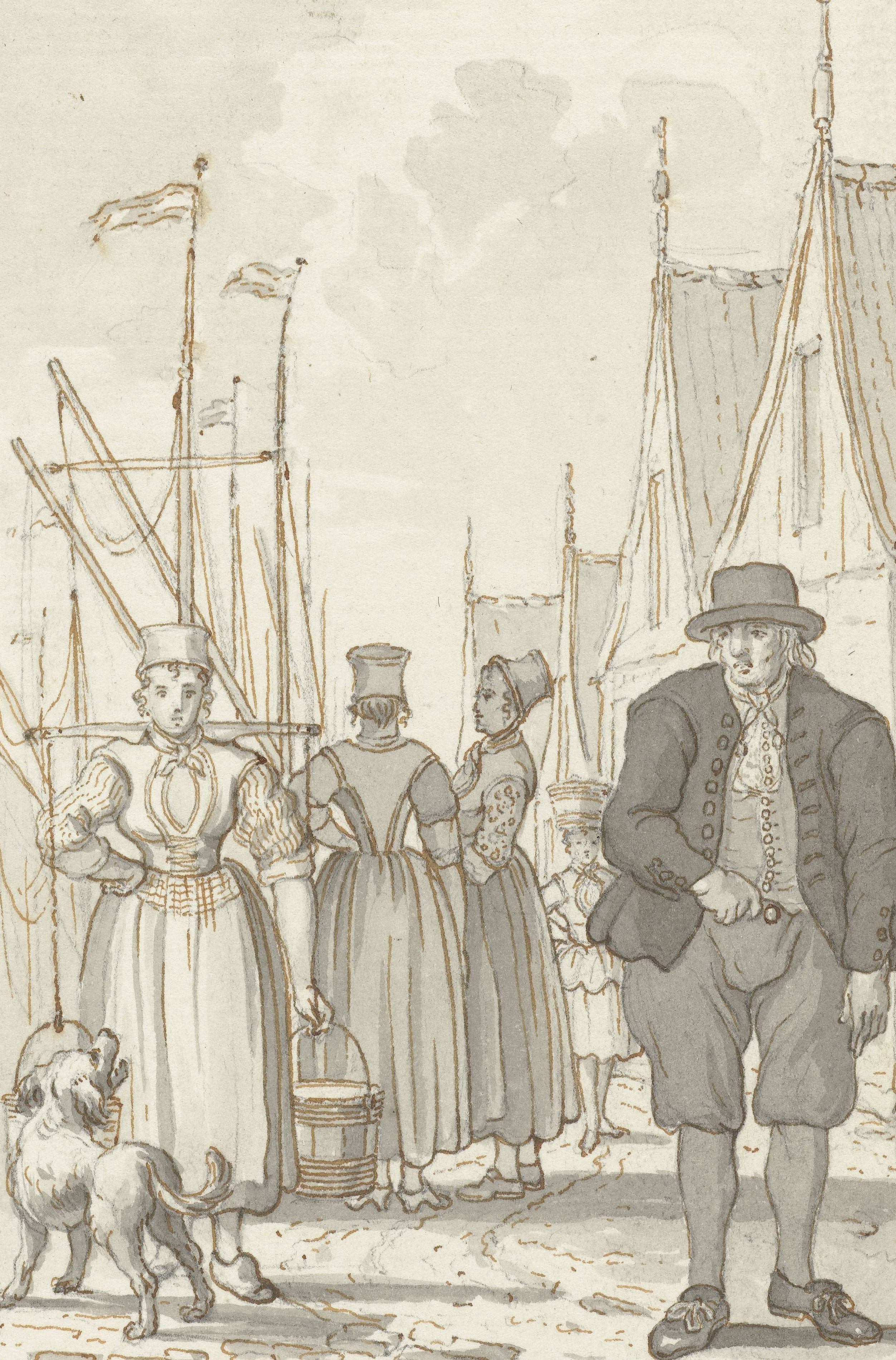 Mannen en vrouwen in de kleding van Emmeloord. Op karton: `Kleeding van van Mannen en Vrouwen op Emmeloort', door Vinkeles gegraveerd in 1787.